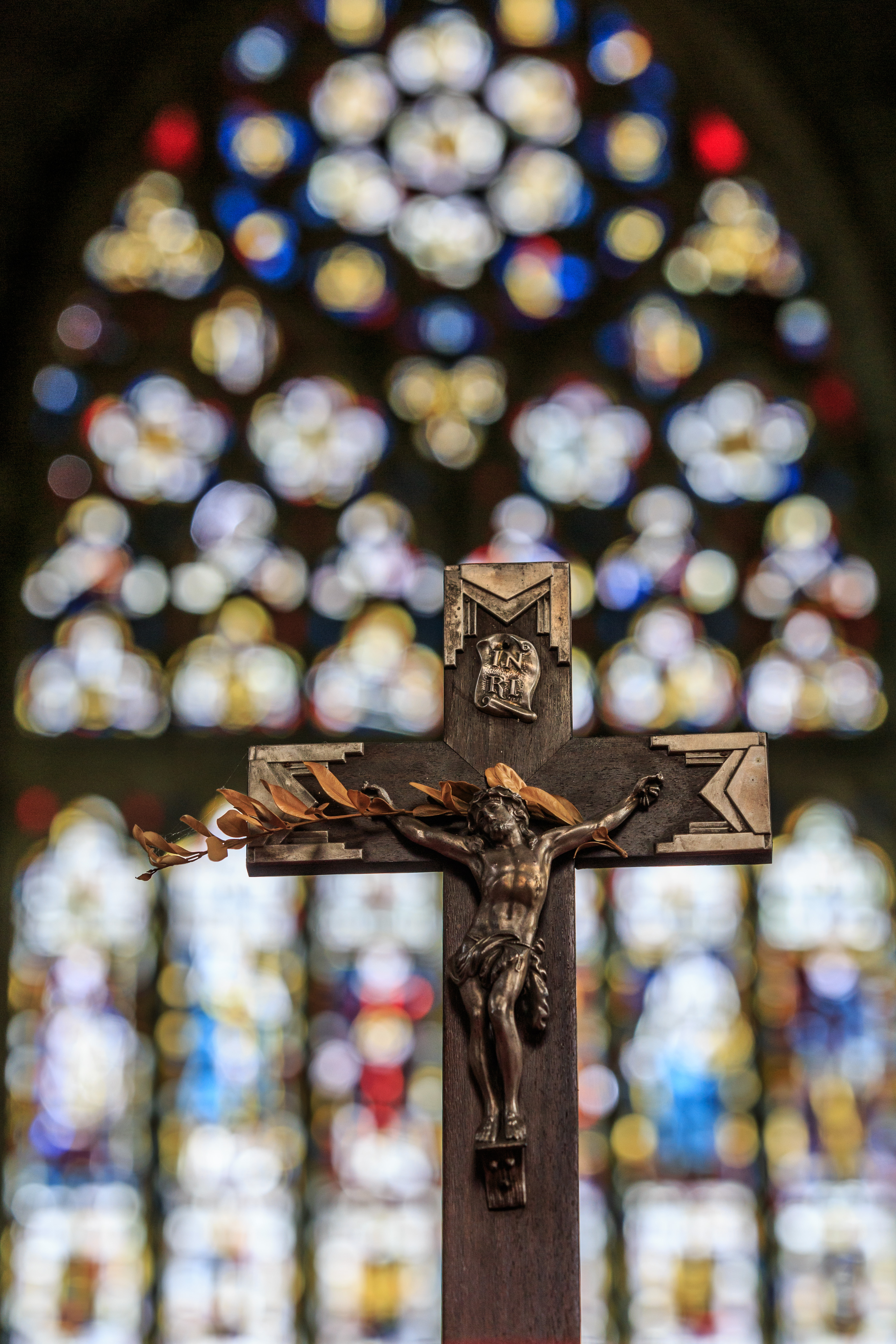 Croix sur l'autel devant la maîtresse-vitre de la chapelle Notre-Dame-du-Kreisker à Saint-Pol-de-Léon (Finistère).